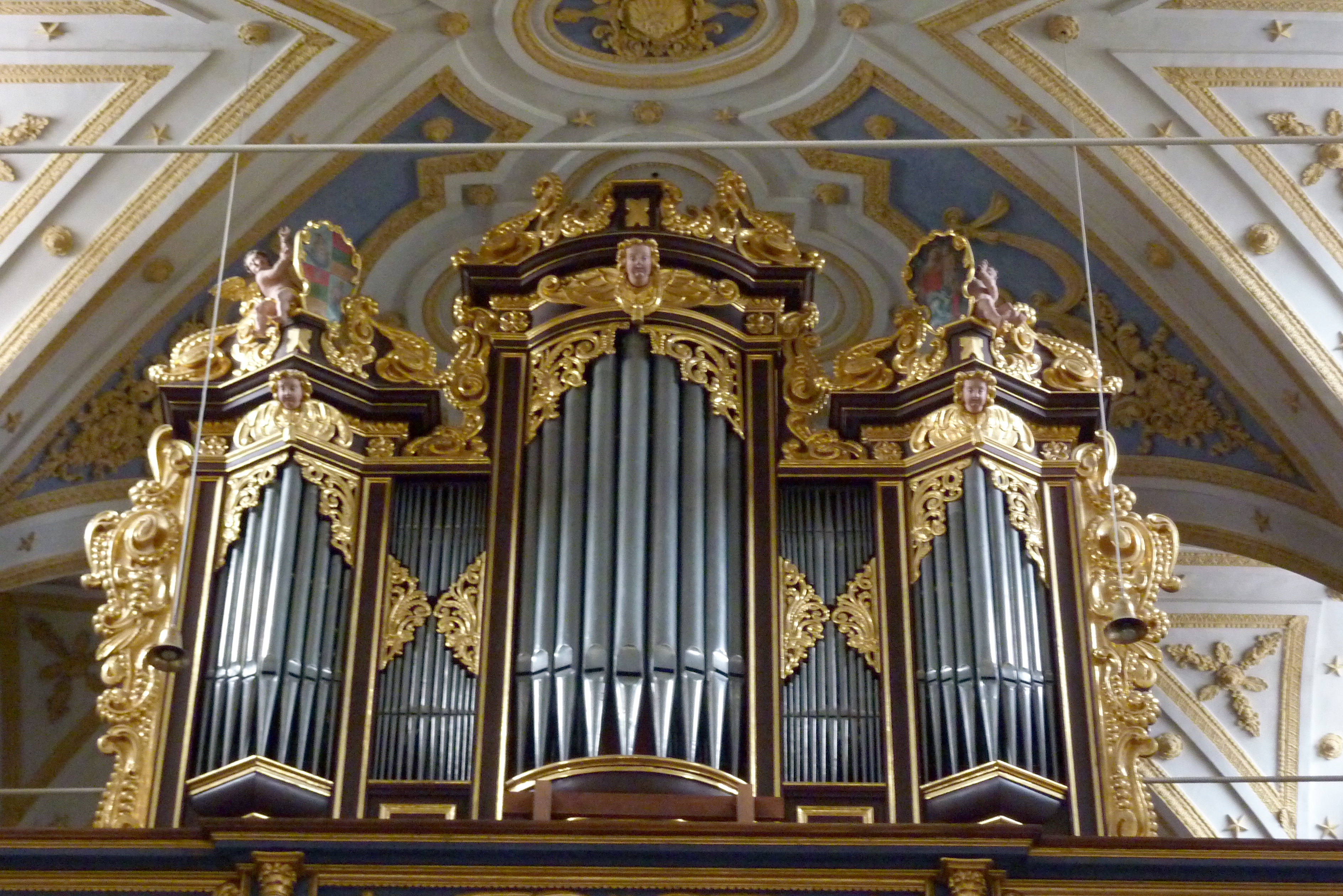 Katholische Pfarrkirche Mariä Himmelfahrt, ehemalige Klosterkirche des Zisterzienserinnenklosters Niederschönenfeld im Landkreis Donau-Ries (Bayern), von 1659 bis 1662 Wiederaufbau durch Konstantin Pader, Orgel von Paul Prescher von 1683